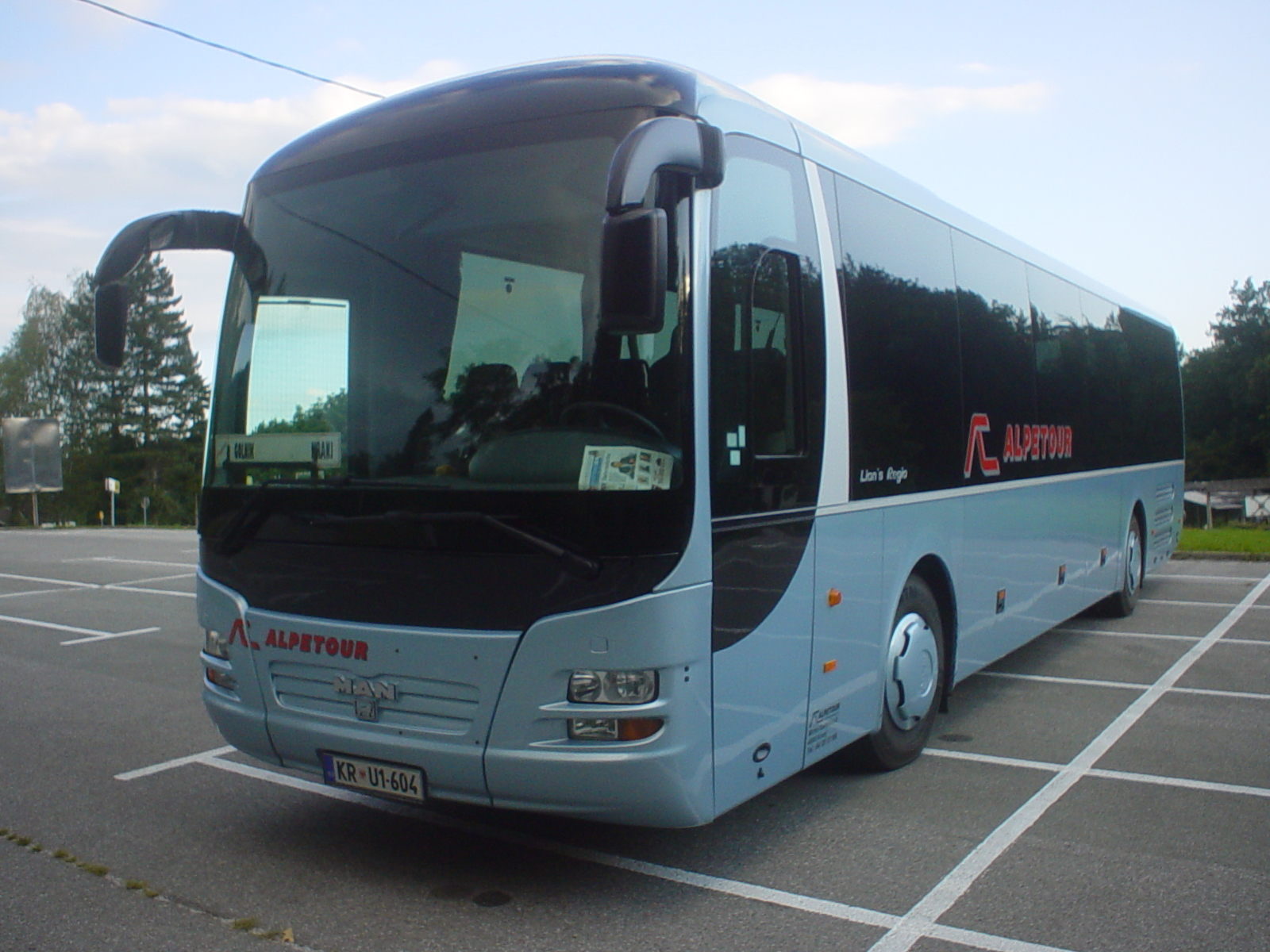 Alpetourjev avtobus na Golniku